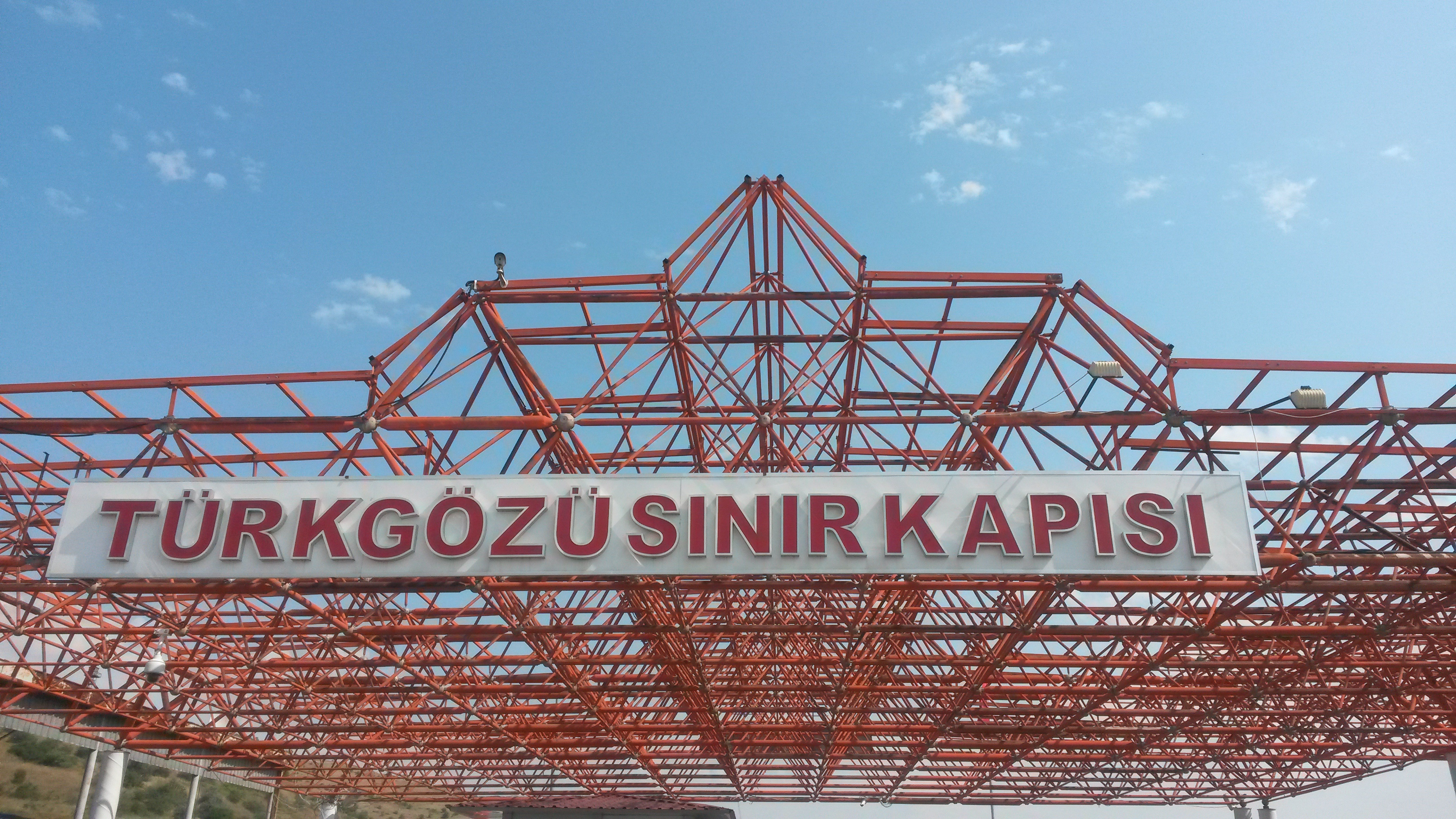 Posof'da bulunan Türkgözü Sınır Kapısı